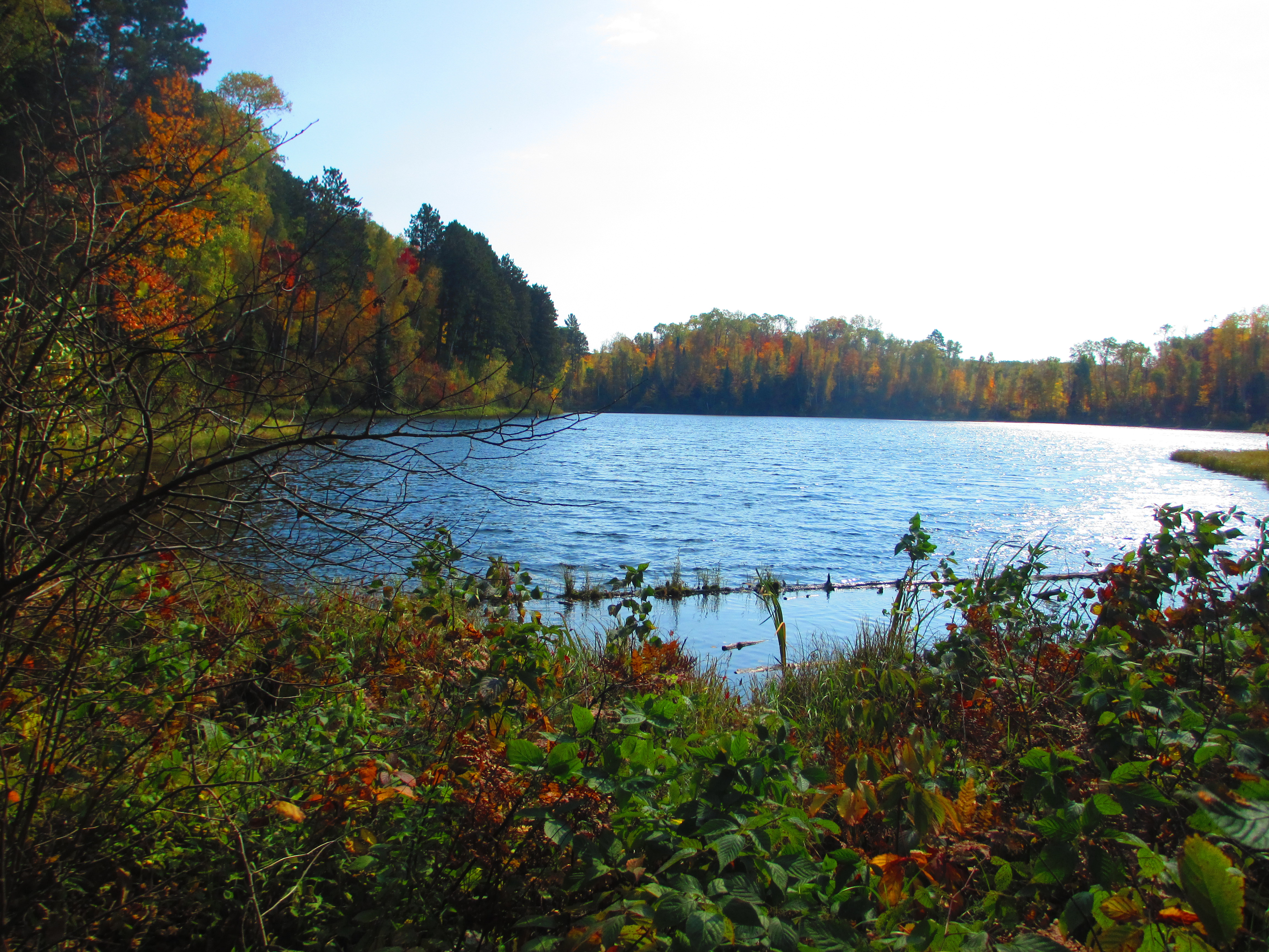 Suomi Hills